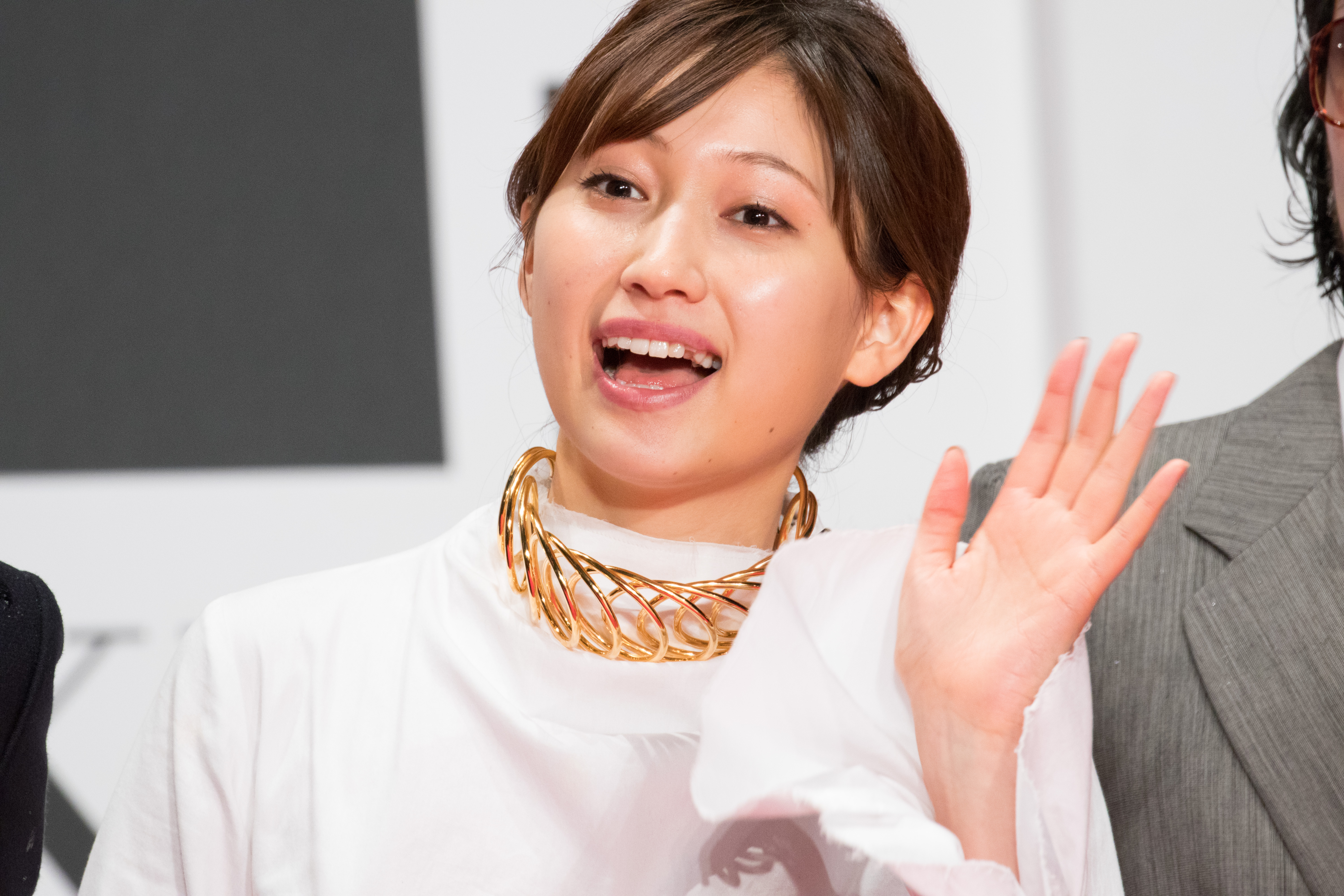 第29回 東京国際映画祭 オープニングセレモニー 大野いと (雨にゆれる女)